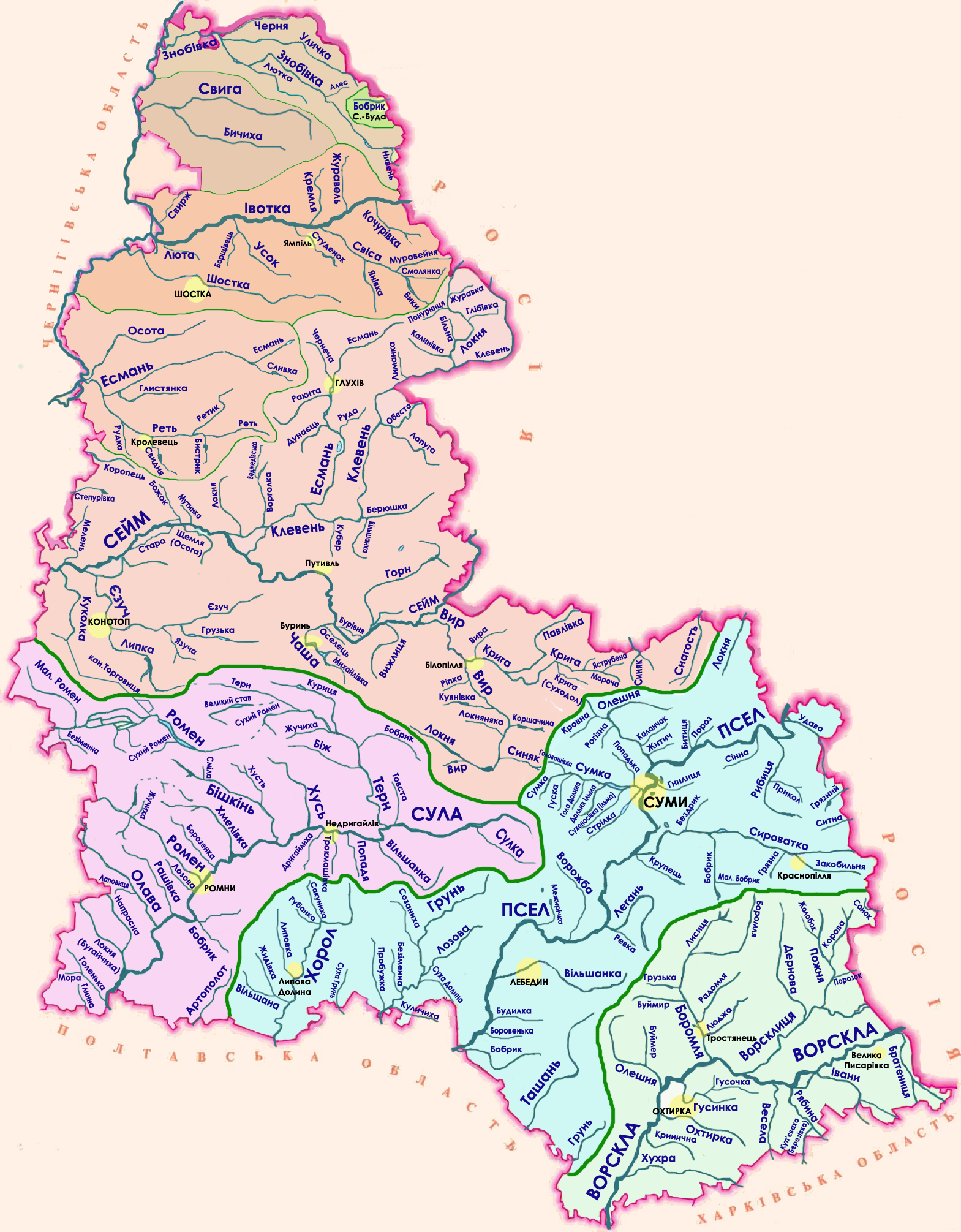 Мапа-схема басейнів річок Сумської області